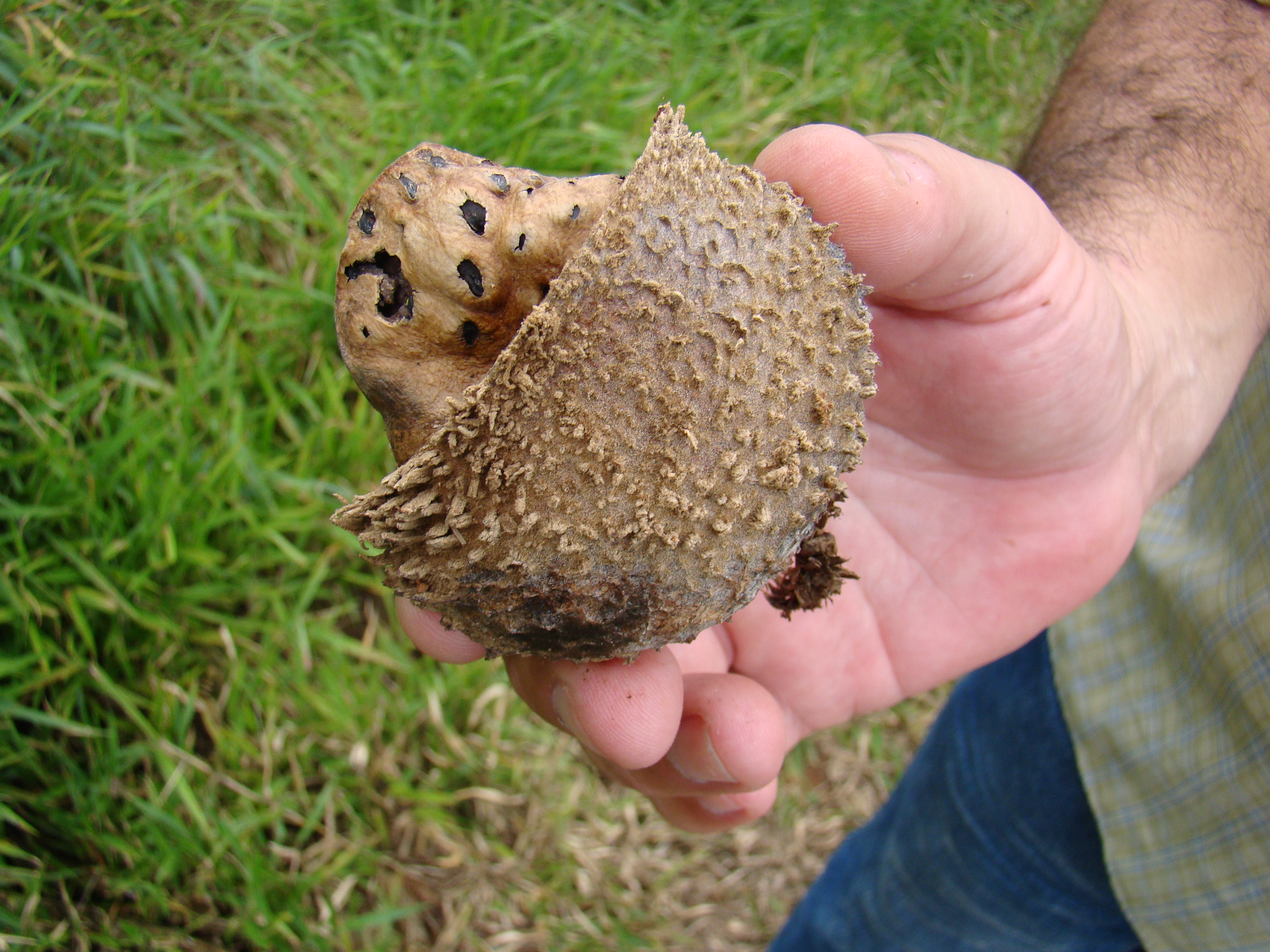 ype felpufo fruit